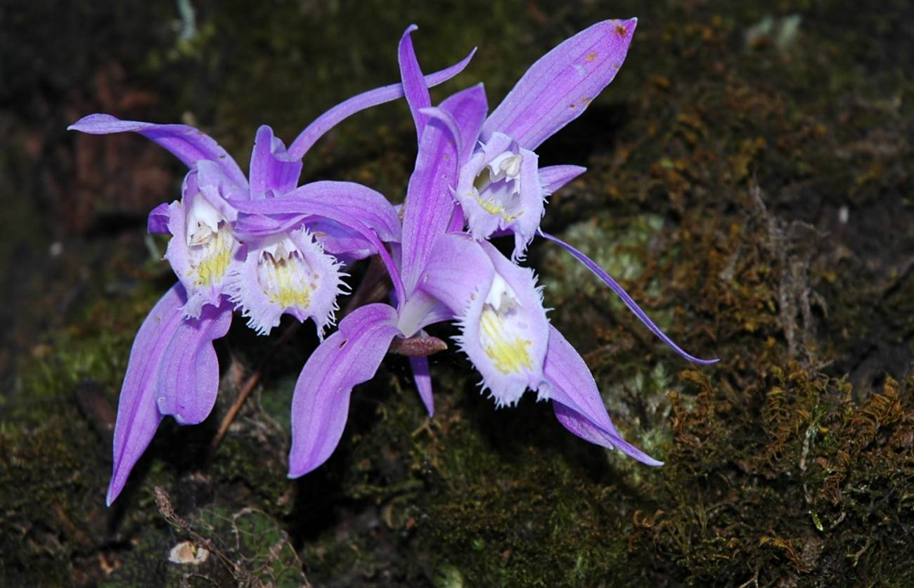 Orchid in Sikkim, seen on the Dzongri Goeche La trek.